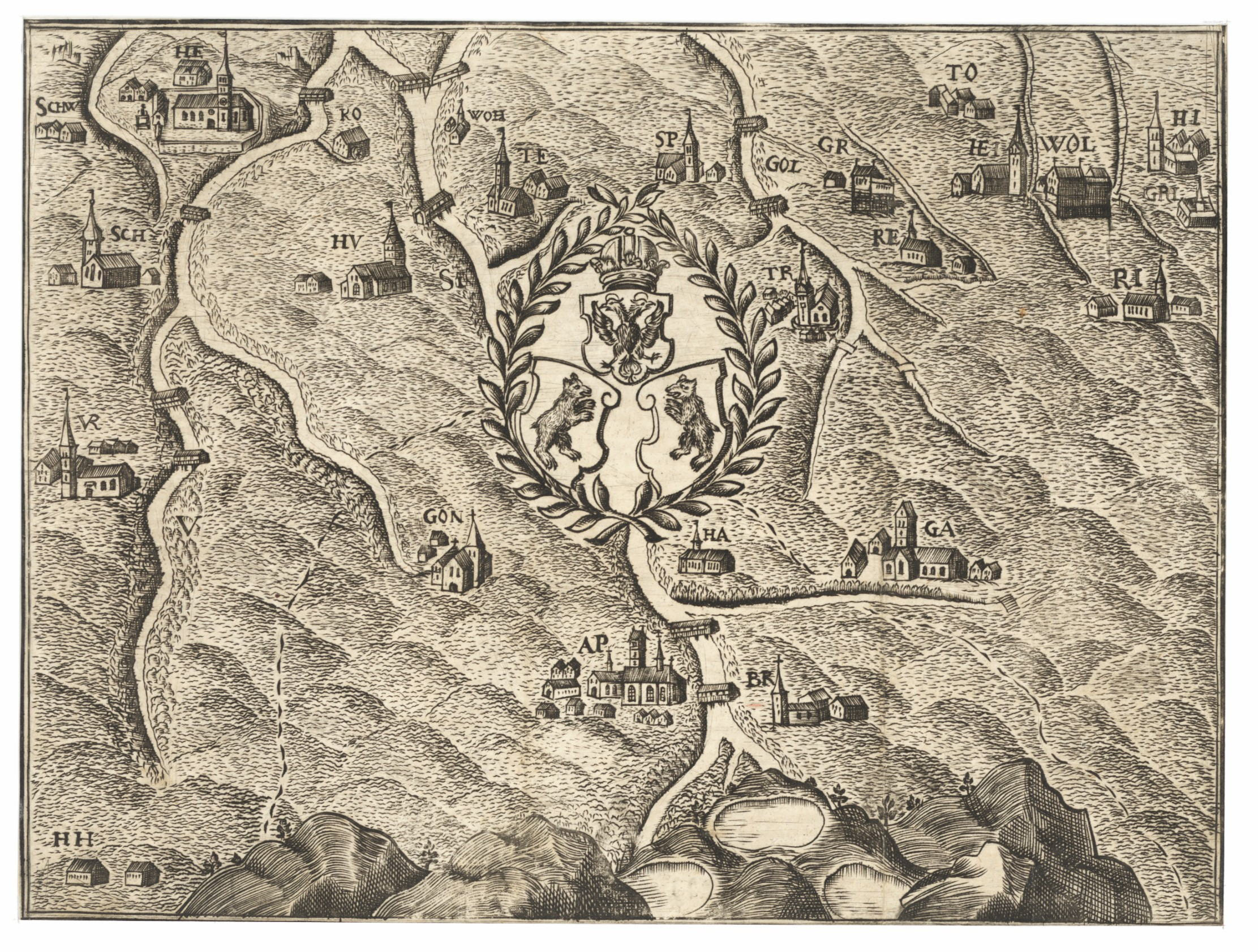 Topografische Karte beider Appenzell, Kupferradierung, monochrom; Bild 18,0 x 14,0 cm, Blatt 19,2 x 14,7 cm, Buchgrafik in der Appenzeller Chronik von Bartholomäus Bischofberger